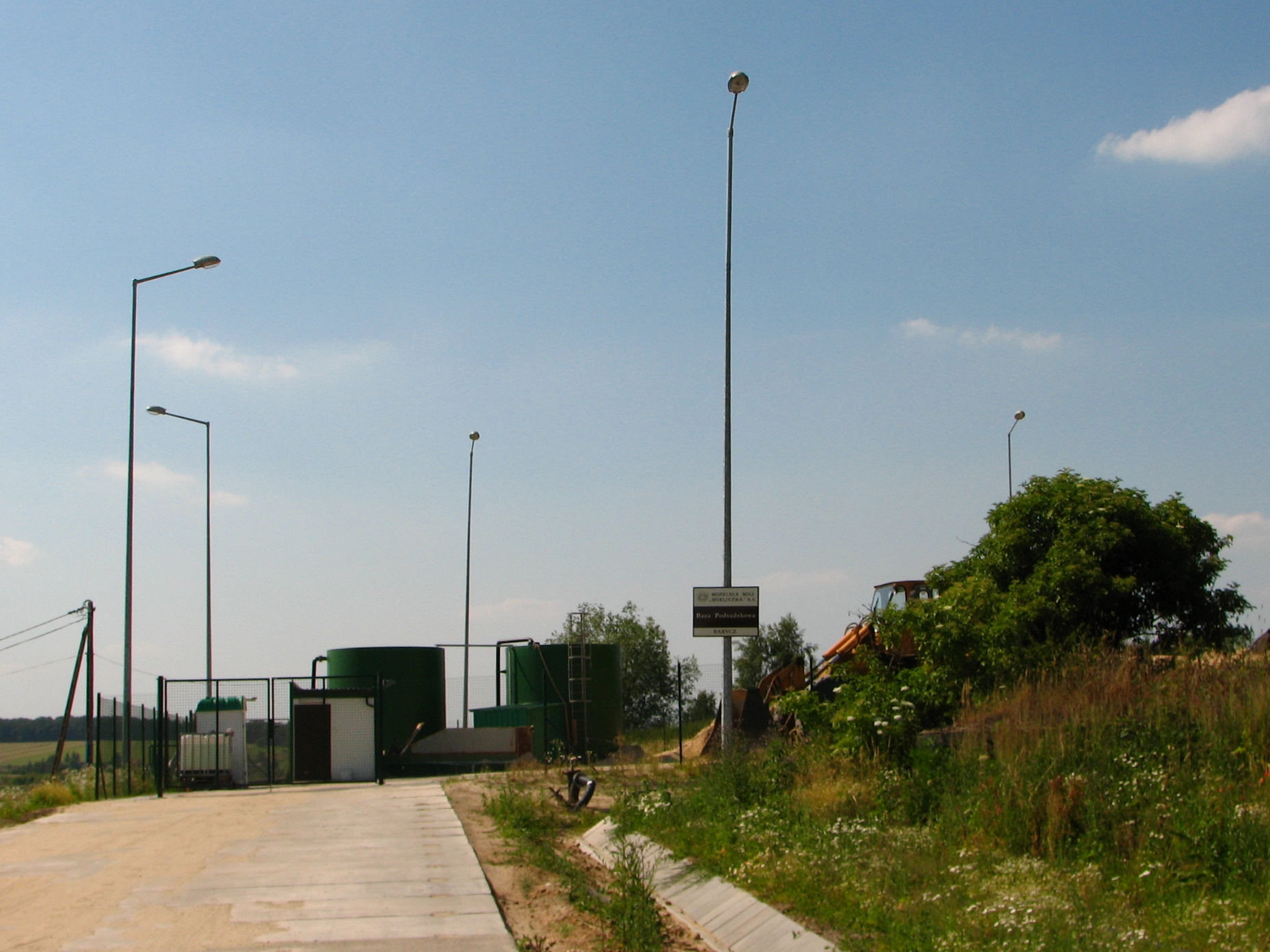 Teren Bazy Podsadzkowej Barycz Kopalni Soli Wieliczka SA w Krakowie-Baryczy.